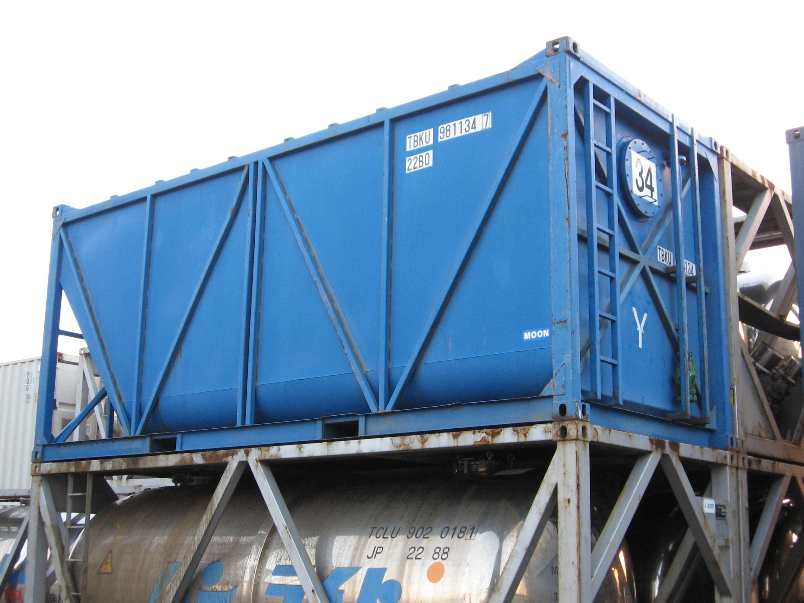 国際海上及び、国内での『 樹脂原料 』輸送用に運用されている、所有者不明の20ft型、バルクコンテナ。 ※コンテナタイプコード ( 22B0 ) 使用。 【 愛媛県／松山新港専用埠頭にて 】